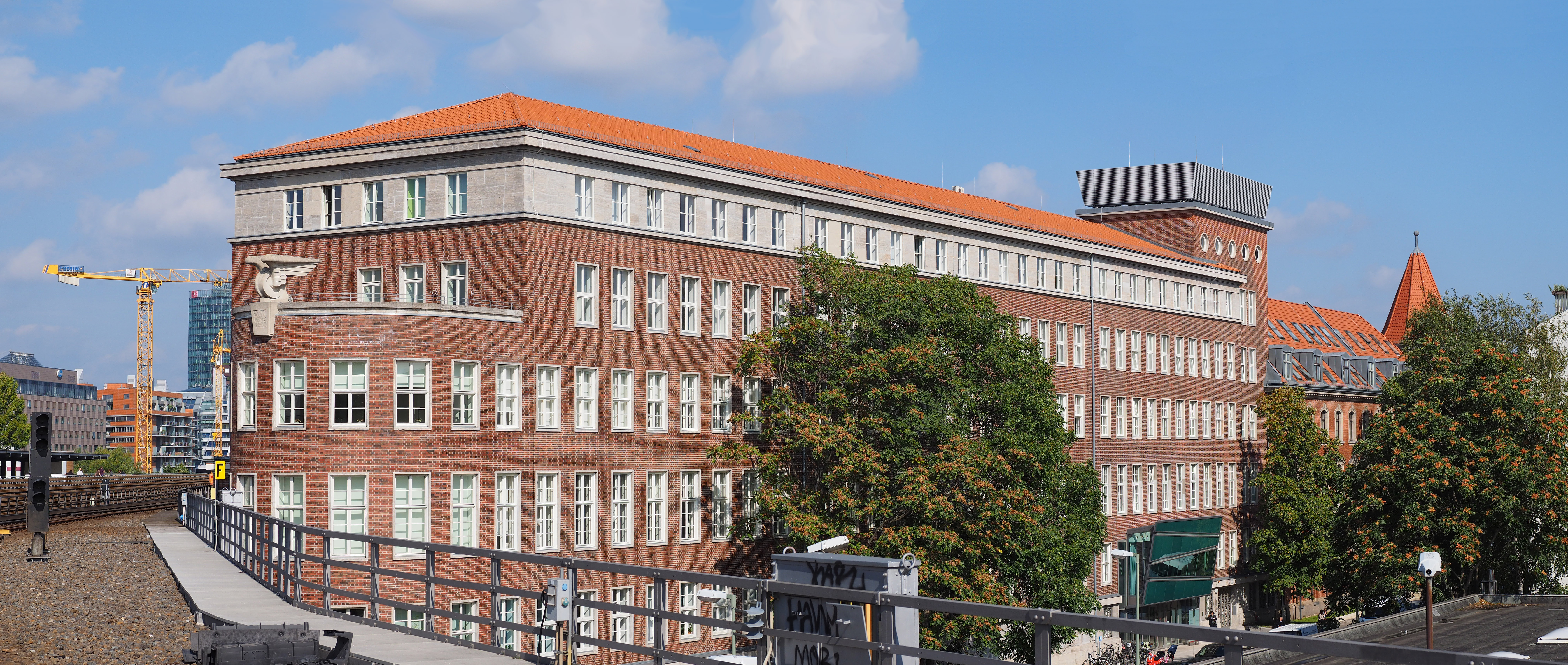 Deitsch: Blick auf das Dienstgebäude der Königlichen Eisenbahndirektion Berlin vom unteren Bahnsteig des U-Bahnhofs Gleisdreieck im Park am Gleisdreieck in Berlin-Tiergarten aus gesehen